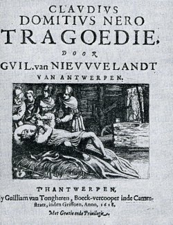 De titelpagina van het toneelstuk "Nero" toont de slotscène van het stuk